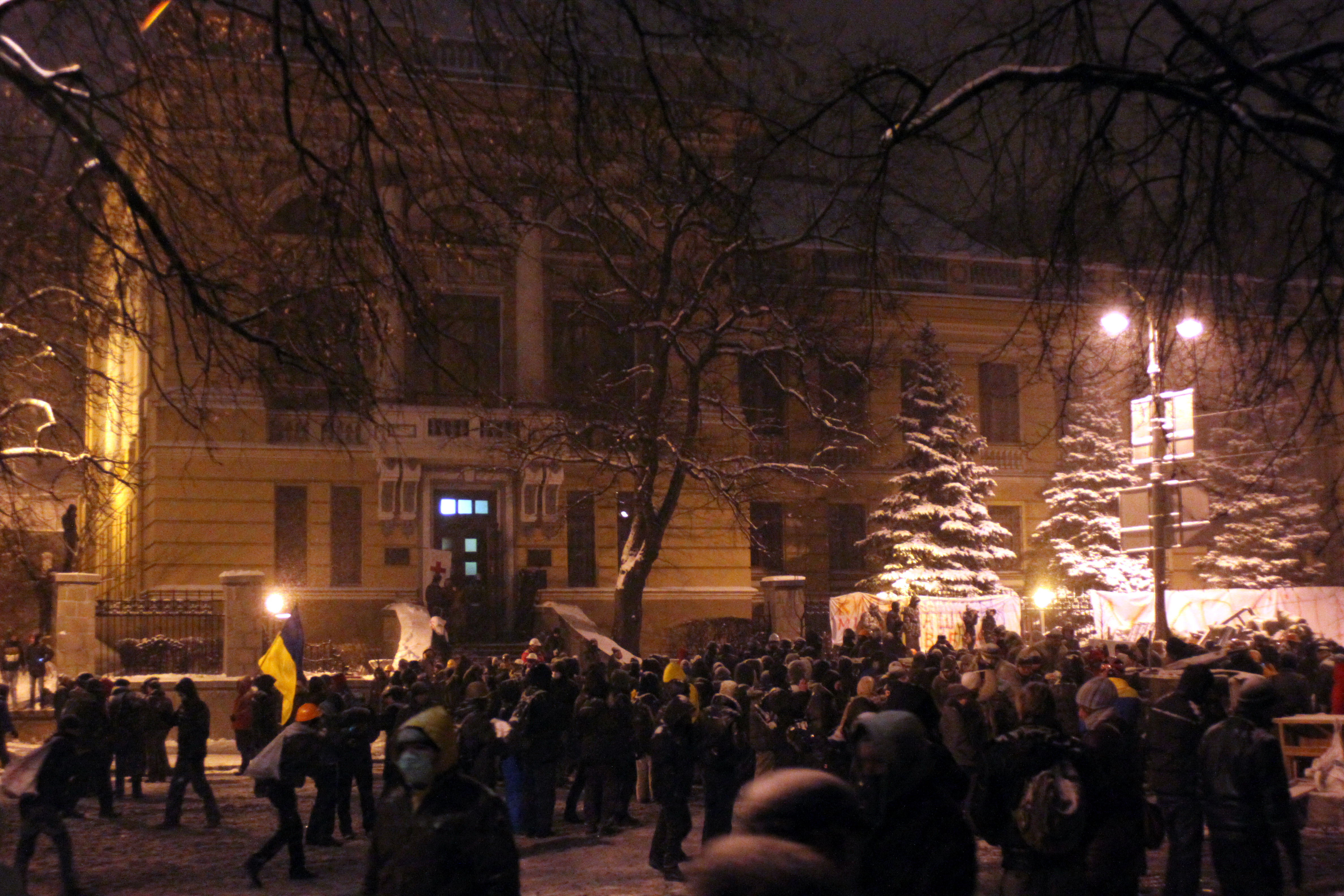 Бібліотека міська публічна (Парламентська), Грушевського Михайла вул., 1, Київ